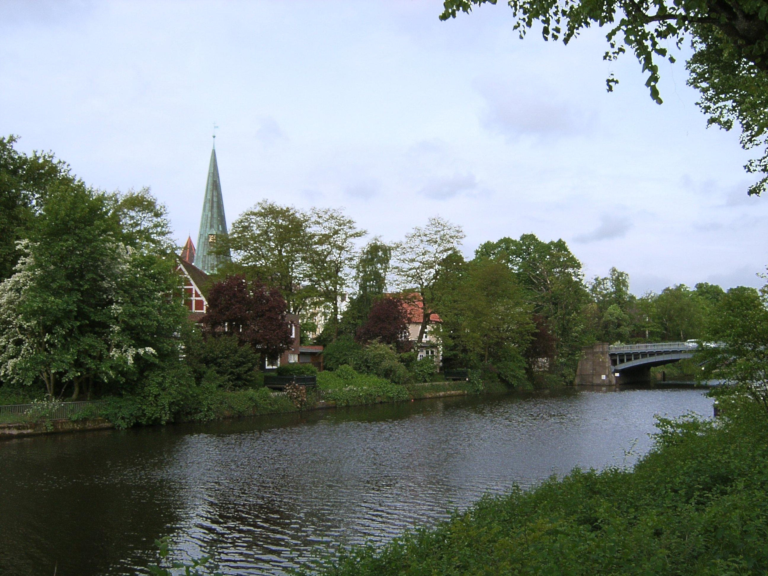 Hamburg, Eppendorf, Alster, Kirche St. Johannis